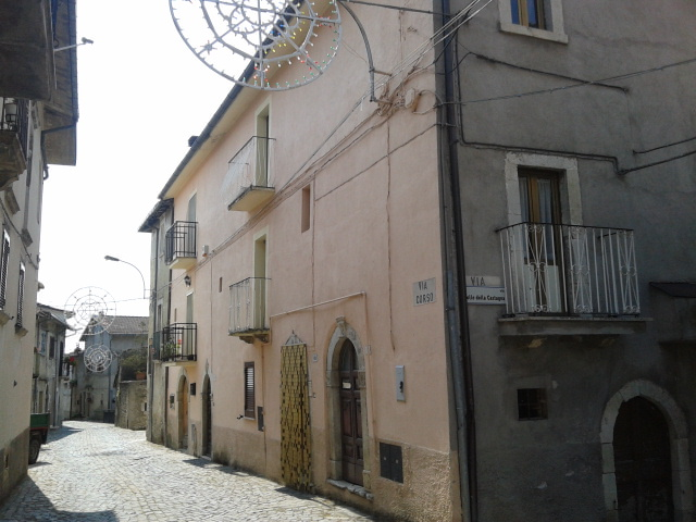 Scorcio fotografico del borgo marsicano di San Giovanni